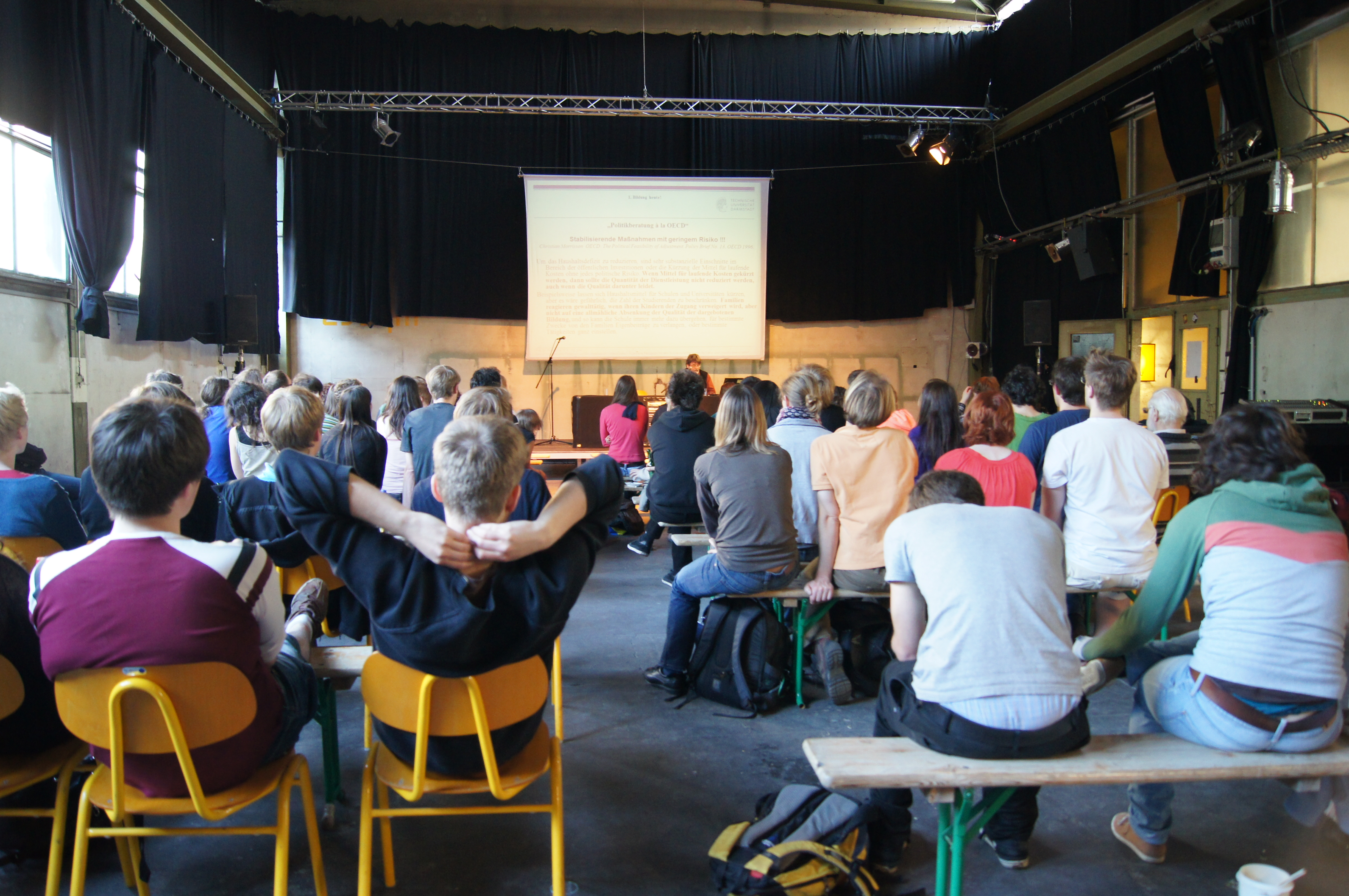 Vortrag von Prof. Peter Euler vor den Synagieren Teilnehmern